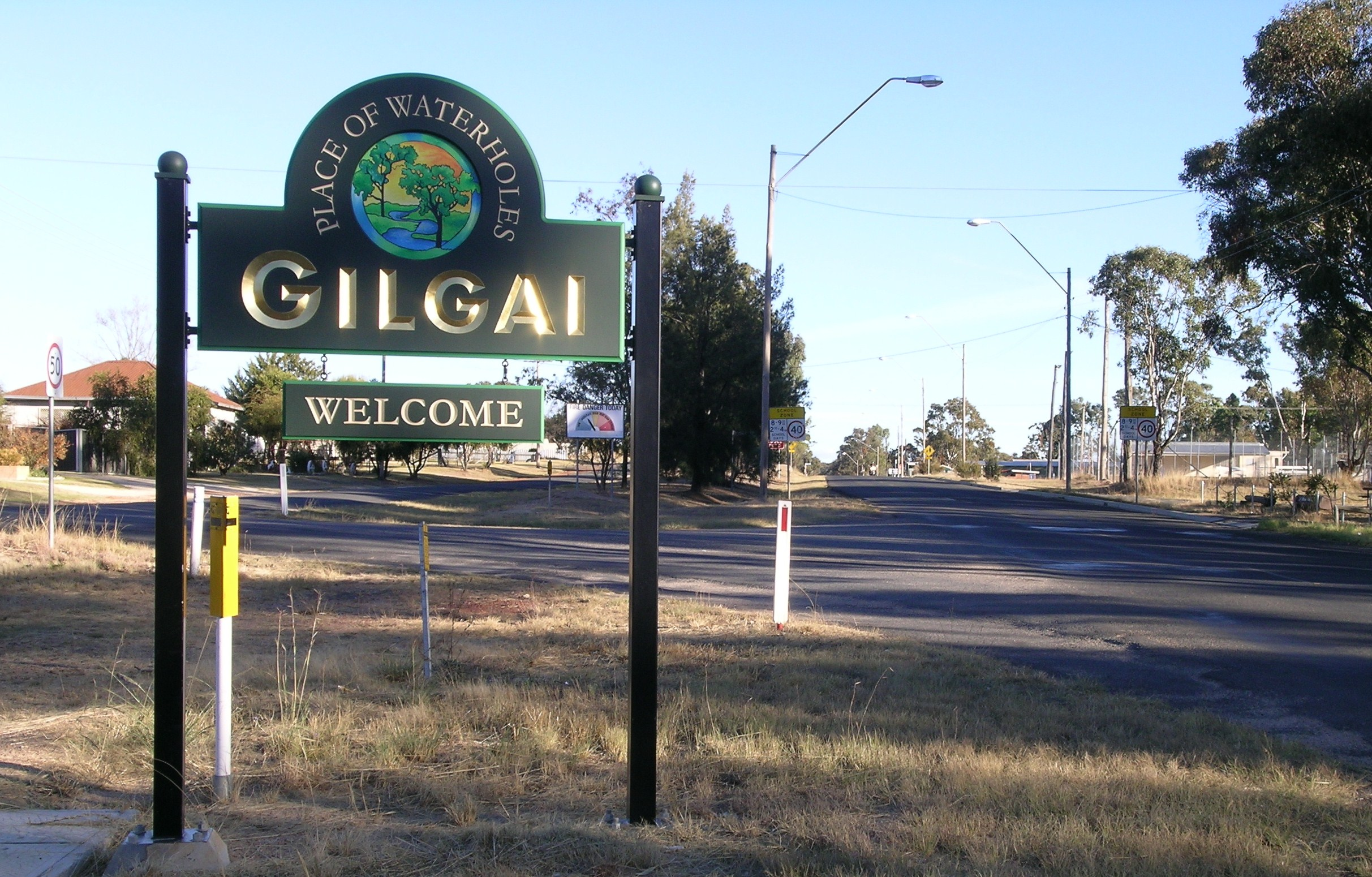 Thunderbolts Way, Gilgai, NSW